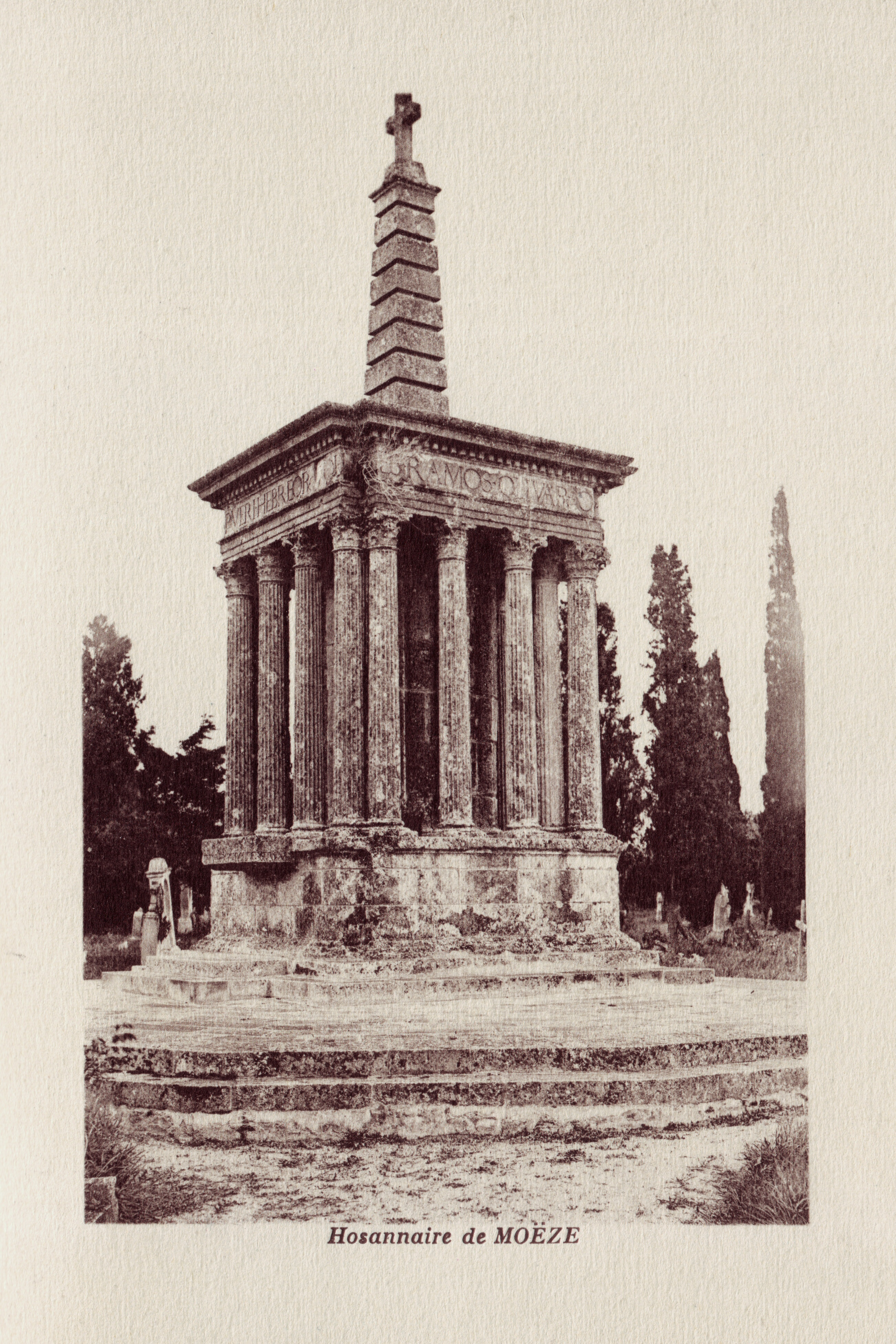 Croix hosannière Moëze Charente-Maritime France. Image libre de droit (domaine public) obtenue par la numérisation d'un document imprimé sur papier d'Arches dans le livre Rochefort-sur-Mer et le Bas-Pays Charentais de René Memain, Édition d'Art Raymond Bergevin, La Rochelle, 1927.